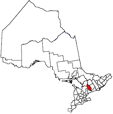 Kawartha Lakes